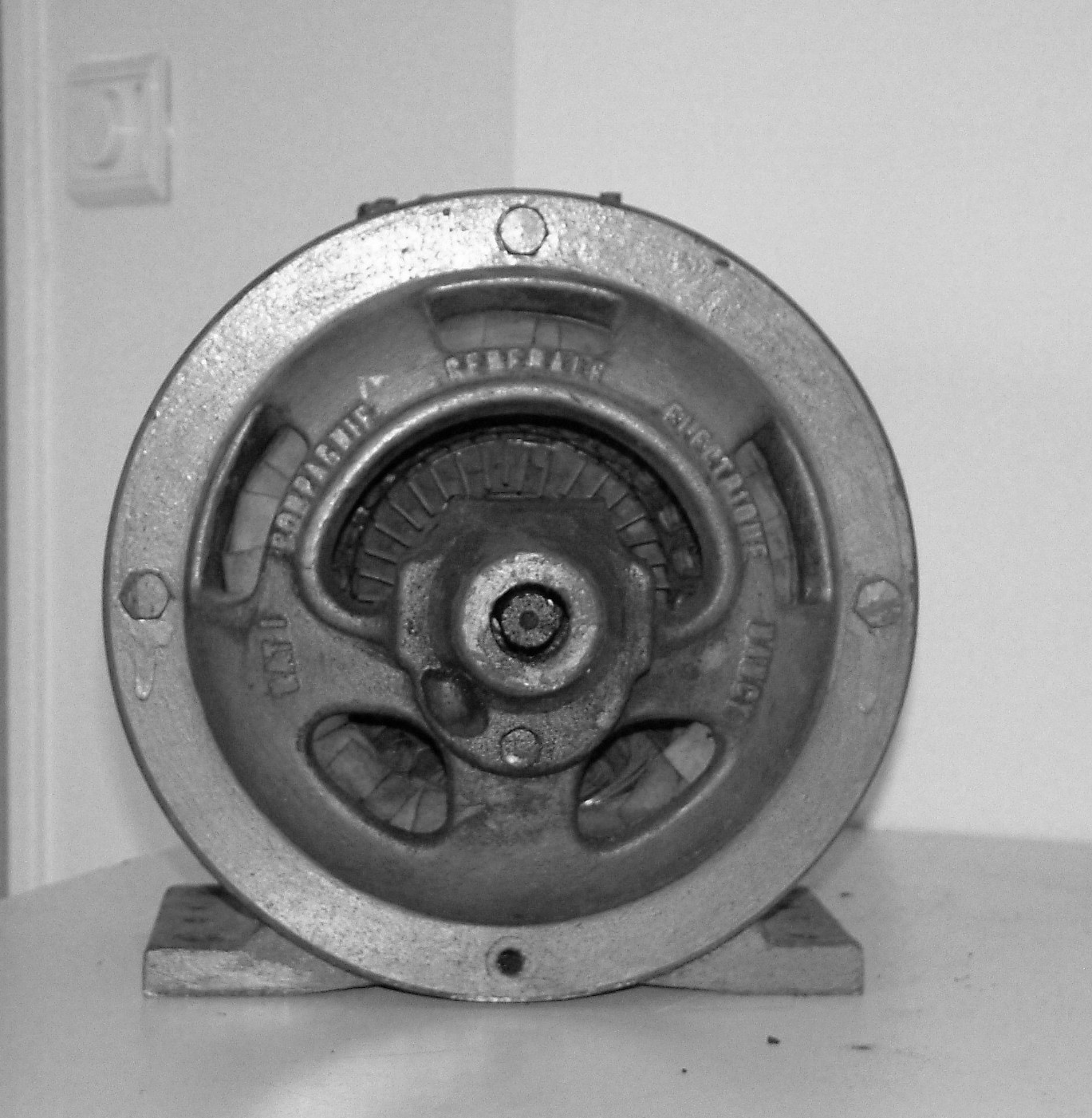 Vue arrière du moteur N°28304